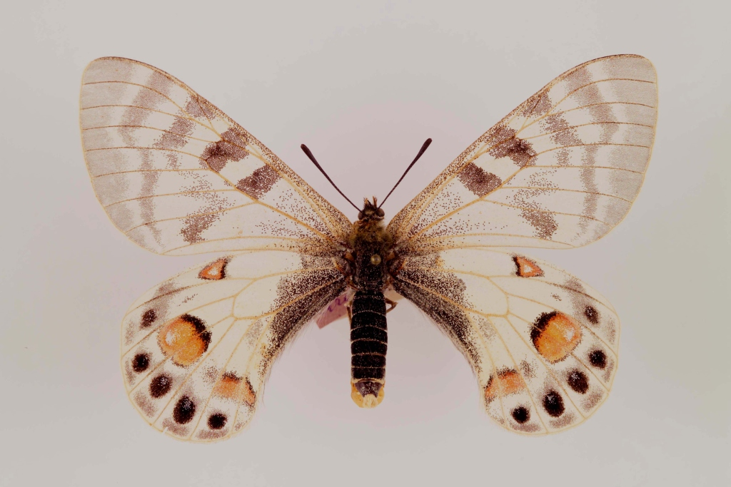 Parnassius charltonius or Kailasius charltonius, from Aram-Kungei, Trans-Alai region